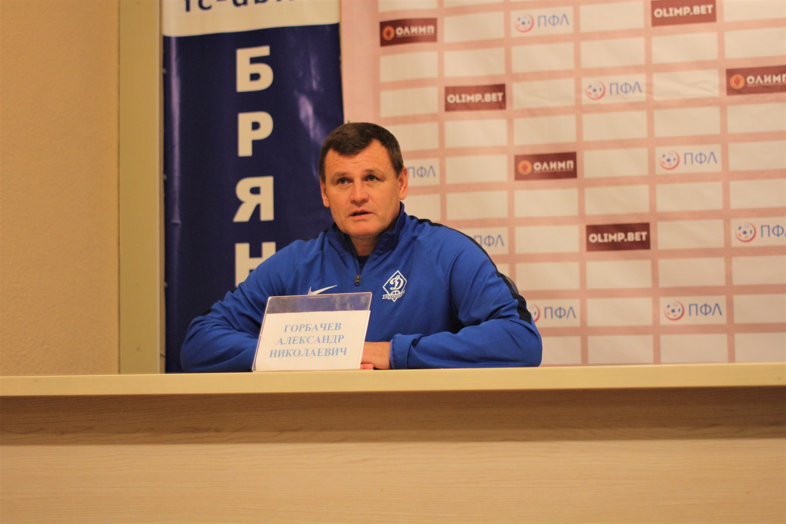 Александр Николаевич Горбачёв